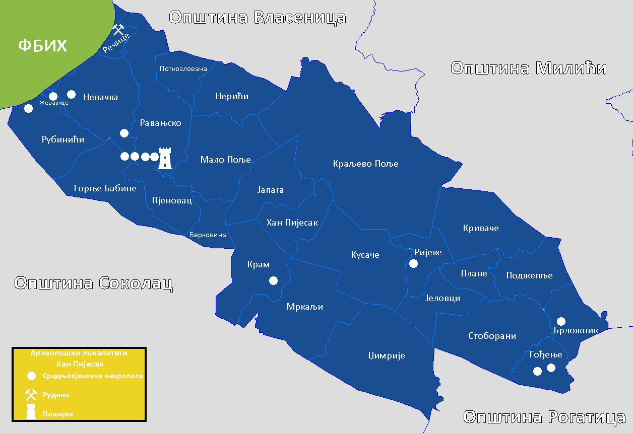 Археолошки локалитети на подручју Хан Пијесака